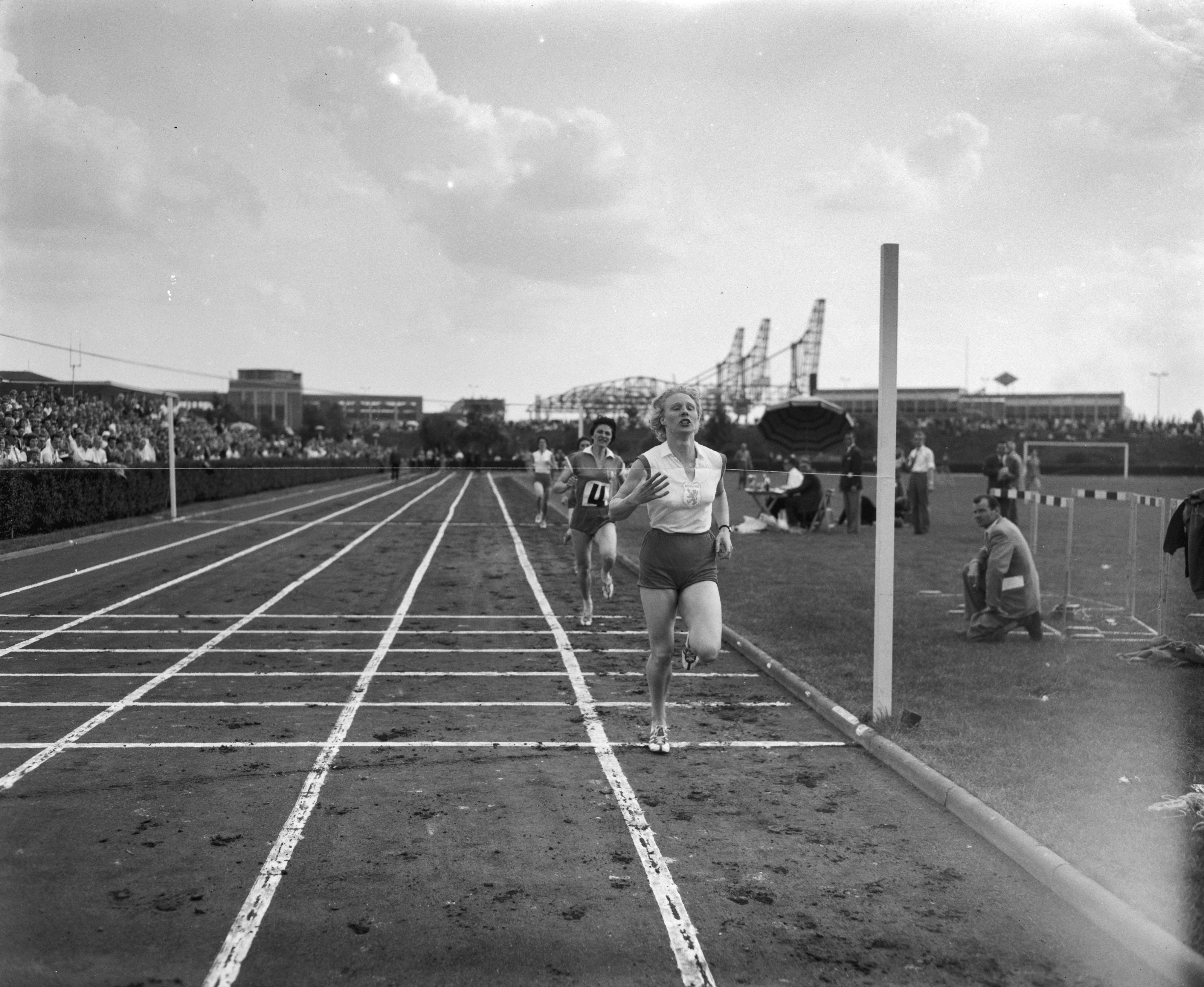 Collectie / Archief : Fotocollectie Anefo Reportage / Serie : [ onbekend ] Beschrijving : Atletiekwedstrijd Nederland-Frankrijk (vrouwen) te Vlaardingen, Ine ter Laak-Spijk wint 800 meter, tweede Maryvonne Dupureur (Frankrijk) Datum : 14 augustus 1960 Locatie : Vlaardingen, Zuid-Holland Trefwoorden : atletiek, sport Persoonsnaam : Dupureur, Maryvonne, Laak-Spijk, Ine te Fotograaf : Behrens, Herbert / Anefo Auteursrechthebbende : Nationaal Archief Materiaalsoort : Negatief (zwart/wit) Nummer archiefinventaris : bekijk toegang 2.24.01.04 Bestanddeelnummer : 911-4993